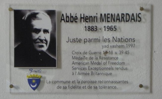 Plaque à la mémoire de l'abbé Henri Ménardais, Juste parmi les Nations, en l'église de Genêts (50).